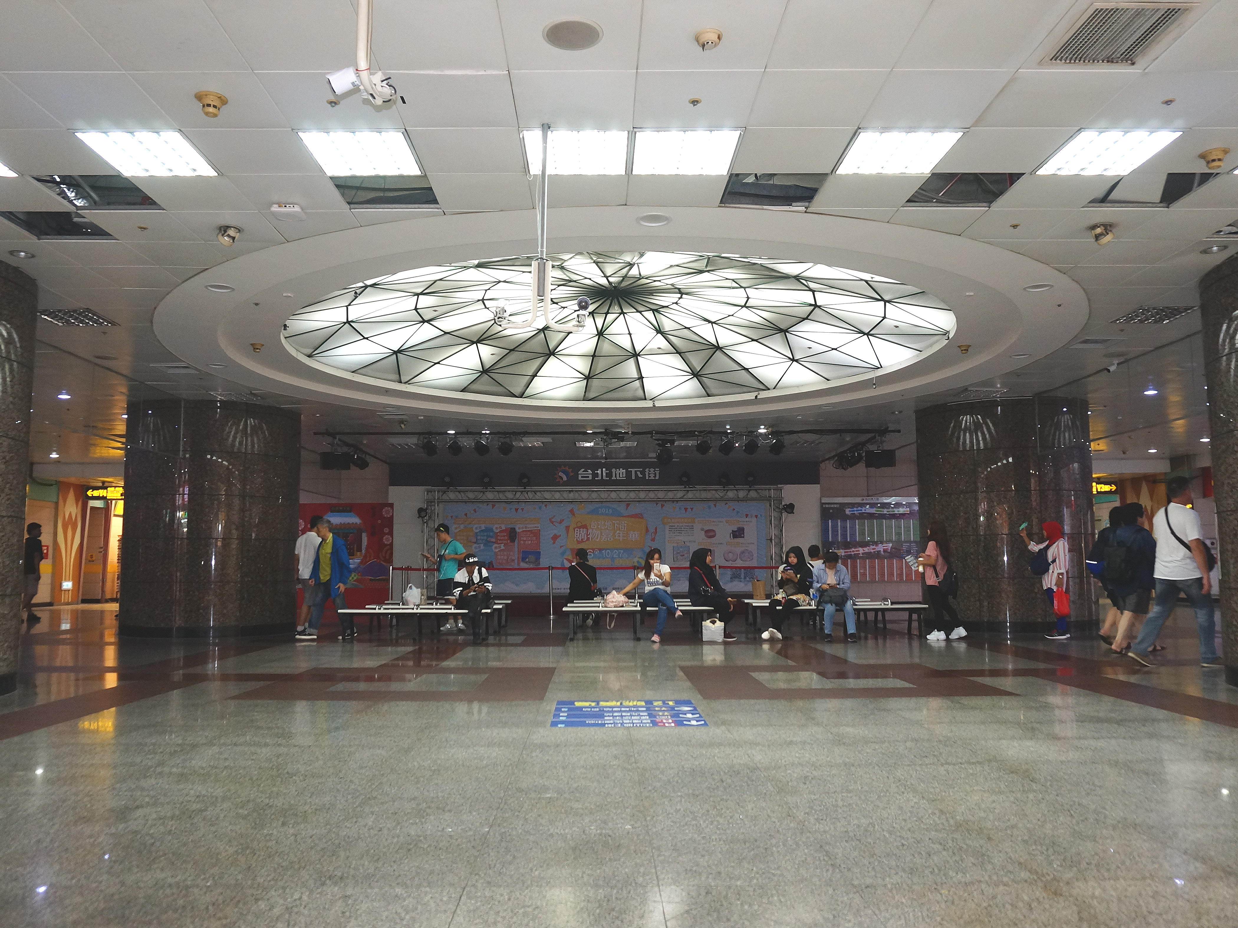 中文（台灣）: 台北地下街12號廣場。